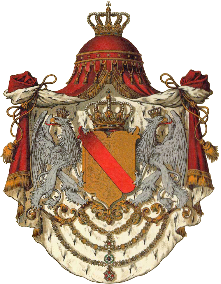 Wappen Grossherzogtum Baden